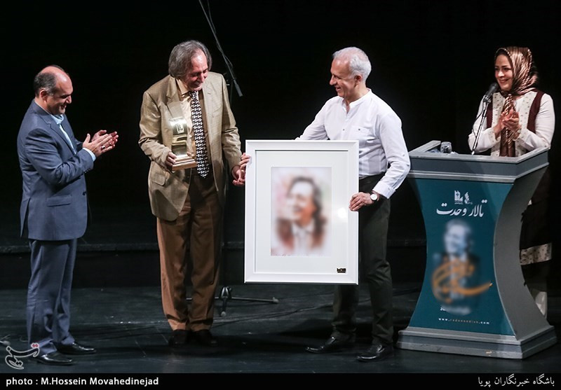 آیین نکوداشت وارطان ساهاکیان آهنگساز و مدرس پیشکسوت موسیقی تالار وحدت تهران